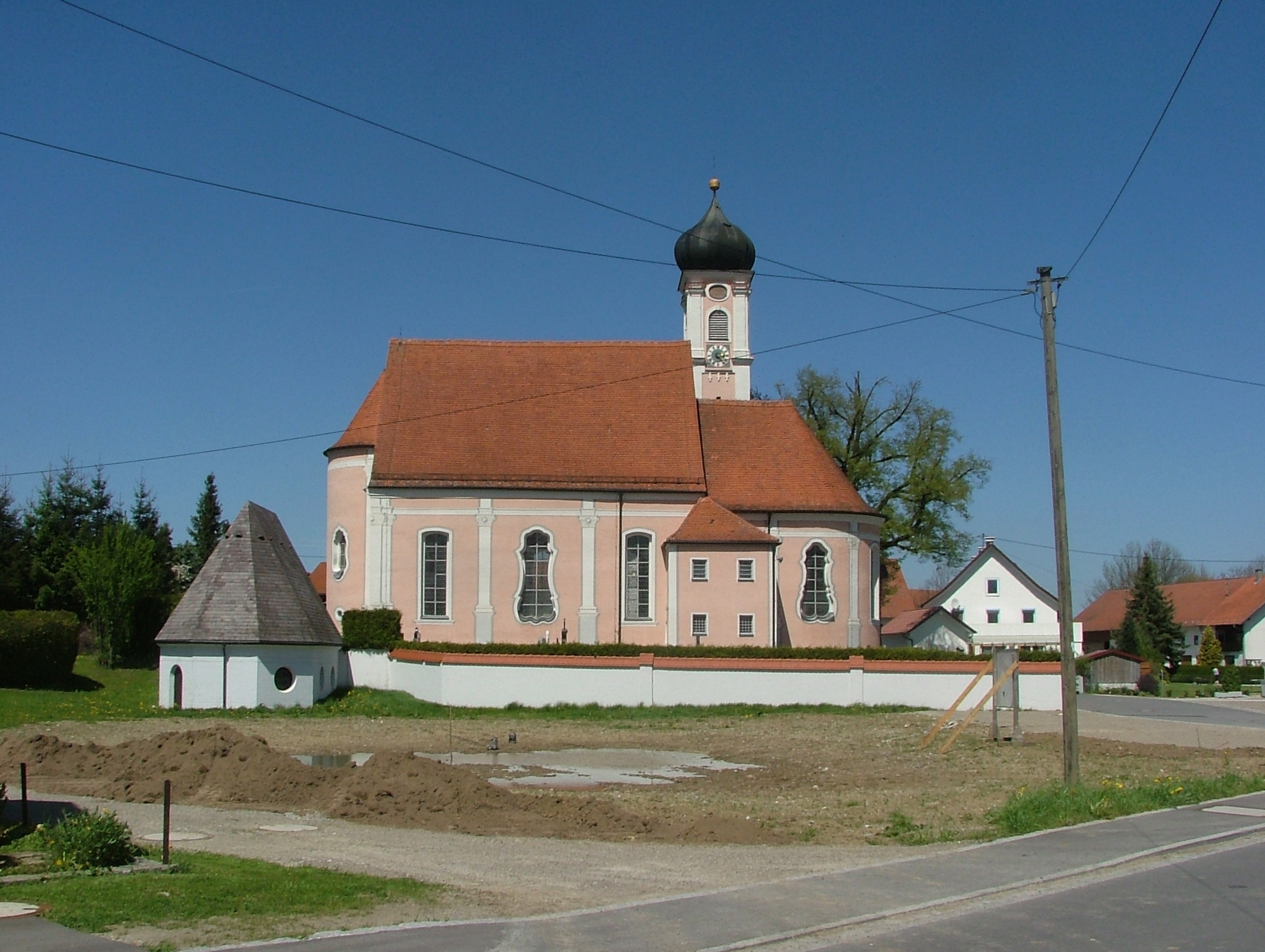 Eutenhausen St.Ottmar